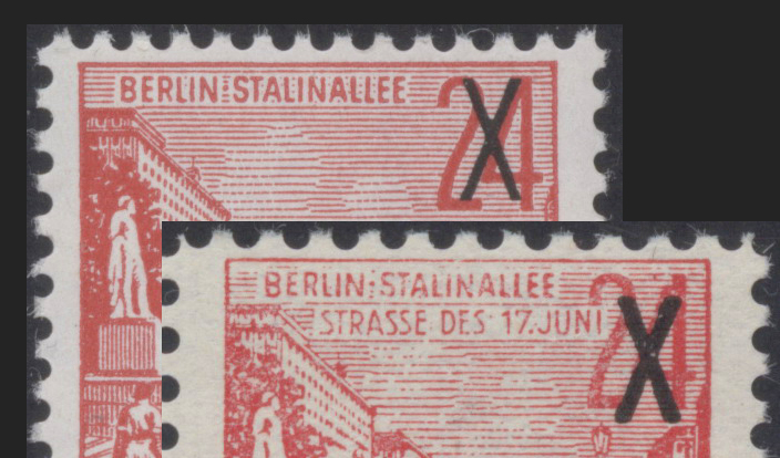 Vergleich einer echten Marke Mi. Nr. 439 (oben) mit der einer KgU-Fälschung (unten)